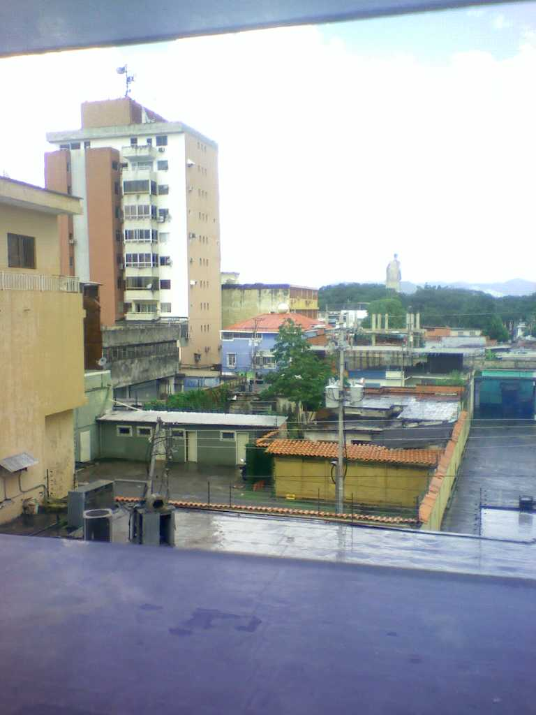 Vista al centro de la Ciudad Guariqueña